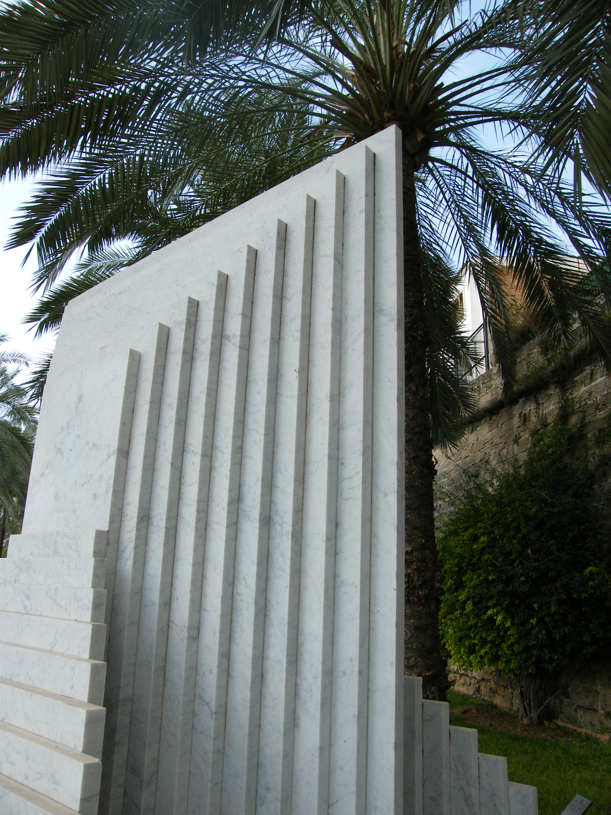 Sculpture Sin título (1999) by Julio Le Parc in Palma de Mallorca/Spain